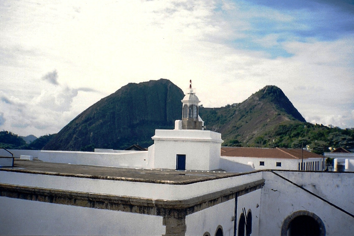 Farol da Fortaleza de Santa Cruz da Barra, Niterói, RJ, Brasil.